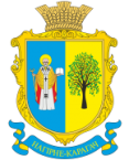 Герб села Нагірне (Ренійський район)